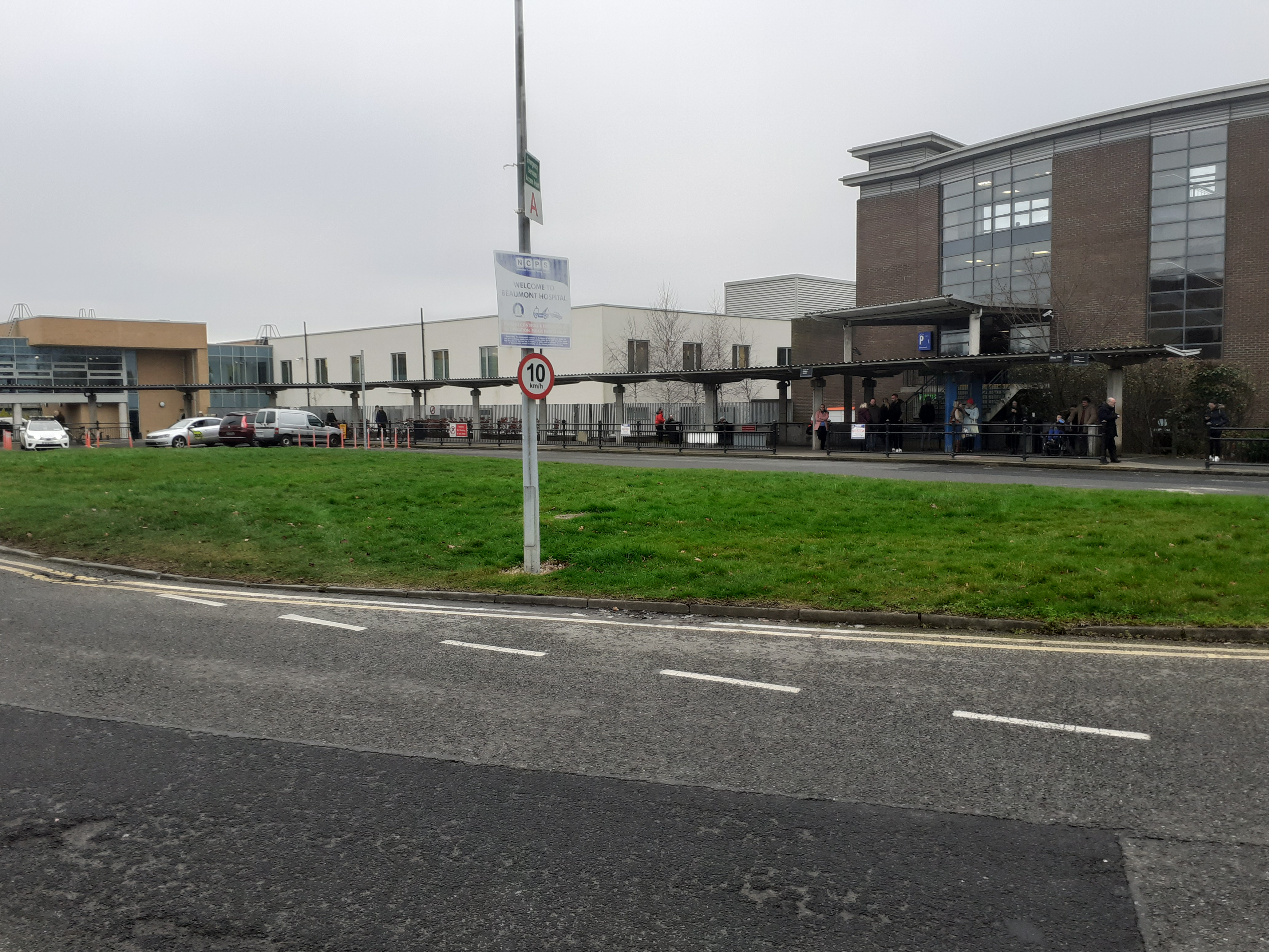 Ospidéal Beaumont, Baile Átha Cliath (2020).